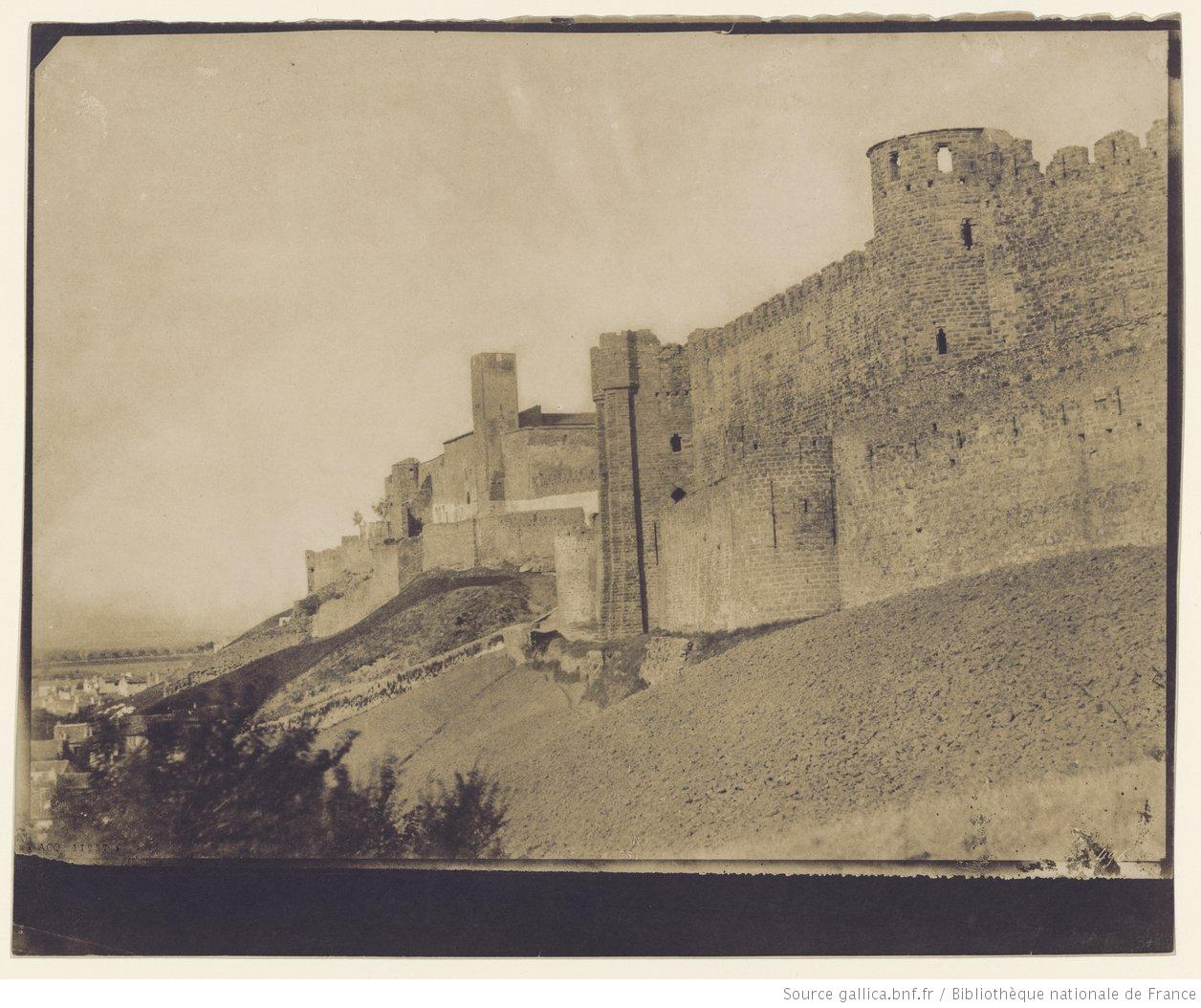 Cité de Carcassonne par Gustave Le Gray (1820-1884). Publiée vers 1851.